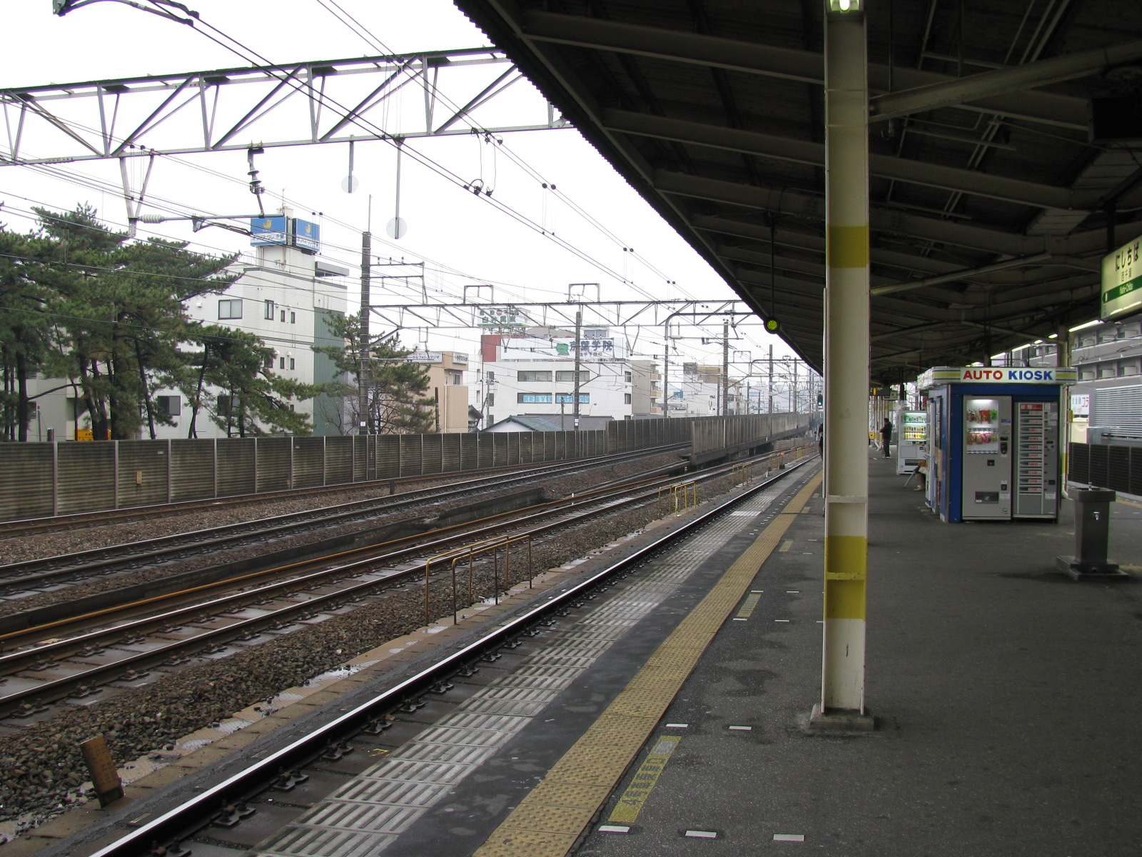 JR西千葉駅から千葉駅方総武線快速線路を見る。